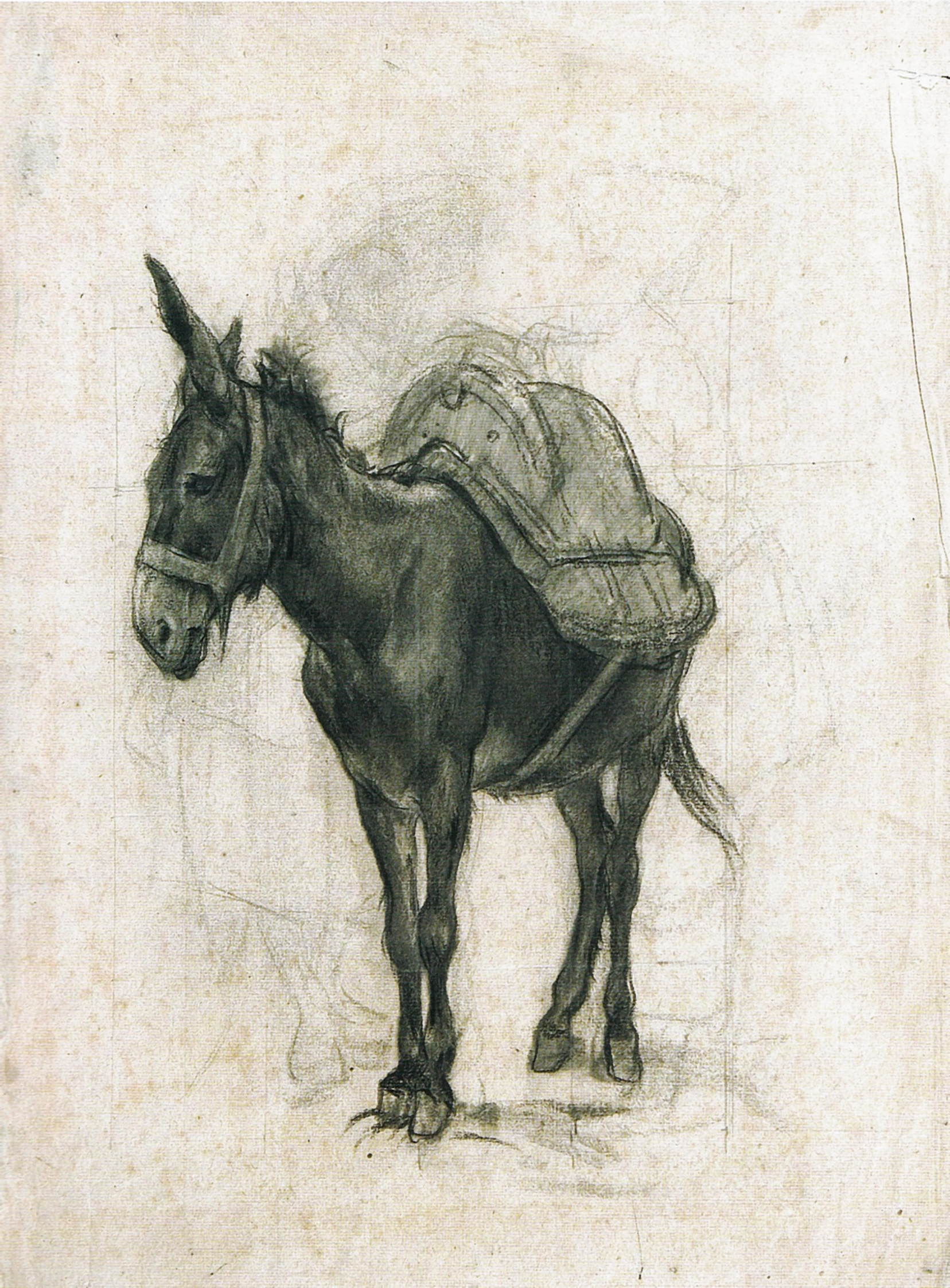 Măgar cu samar, cărbune, conte si estompă pe hărtie vărgată, 36x29cm - Cabinetul de Desene și Gravuri de la Muzeul Național de Artă al României.